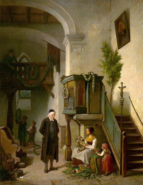 Dorfkircheninterieur (Kinder schmücken unter Aufsicht des Pfarrers den Kirchenraum), Öl auf Leinwand, signiert, 56.5 x 44 cm